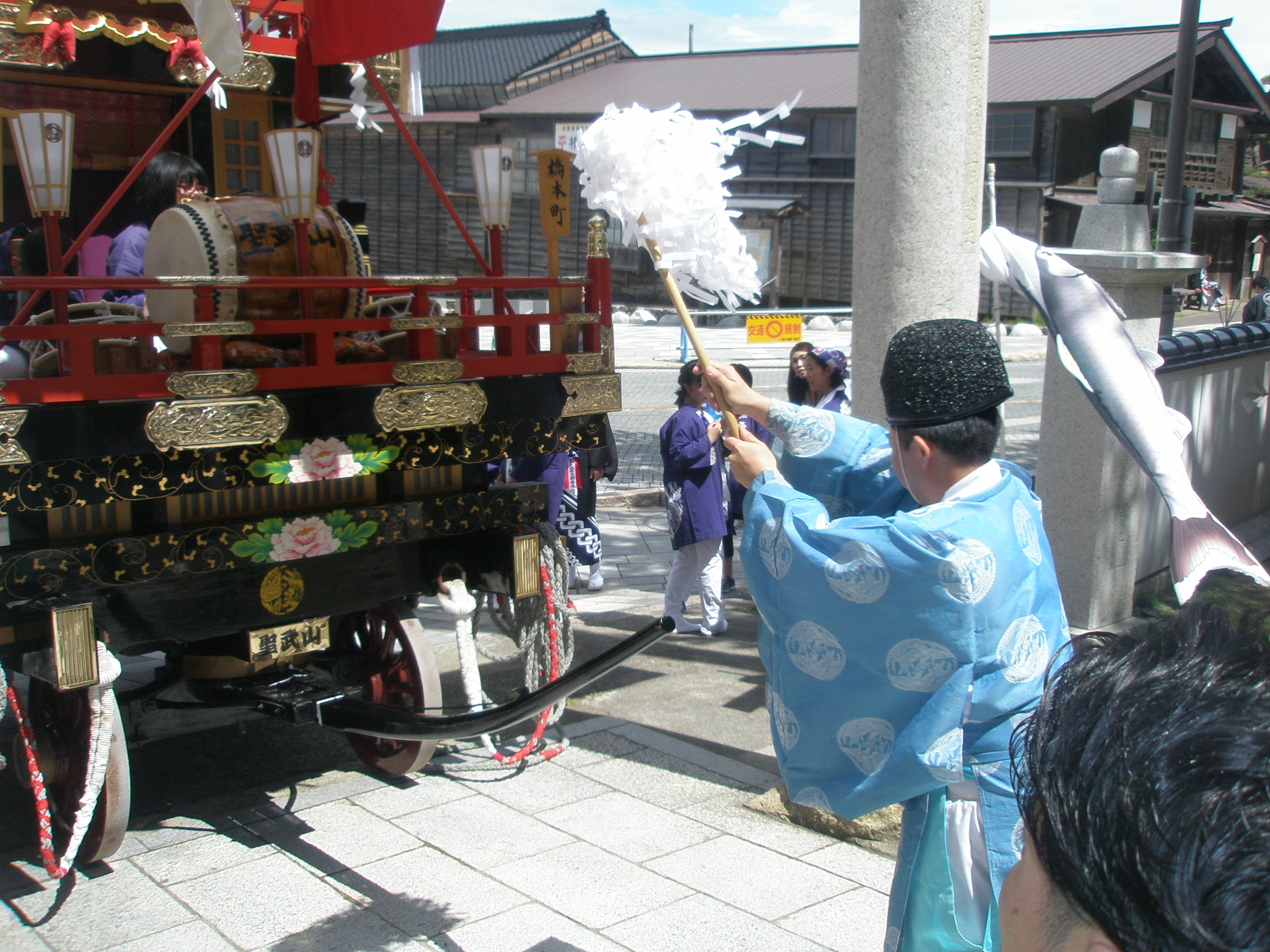 魂入れに伴う山車（聖武山）の修祓、姥神大神宮の鳥居前にて（2018年8月9日撮影）